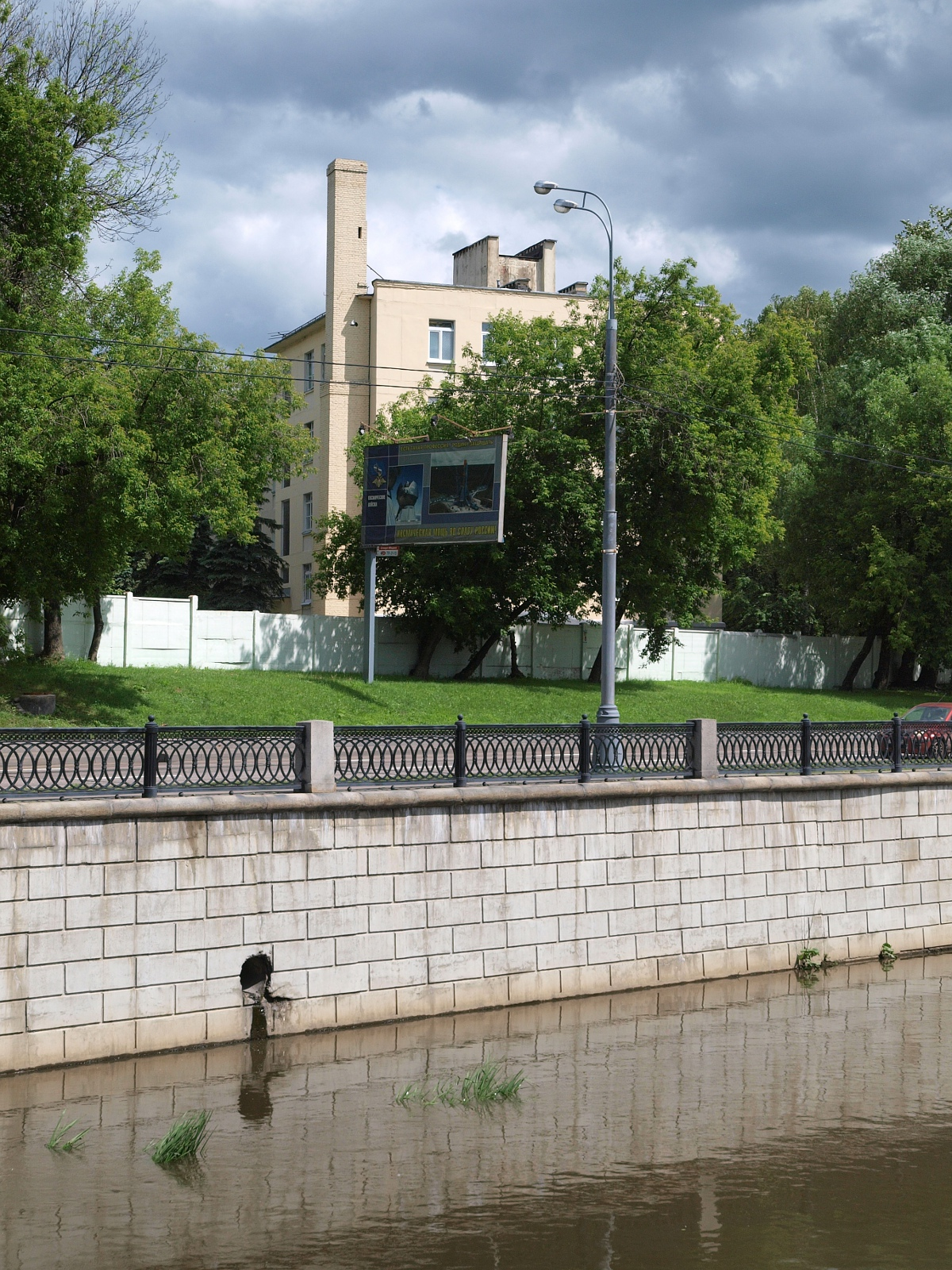 Москва. Набережная Ганнушкина.